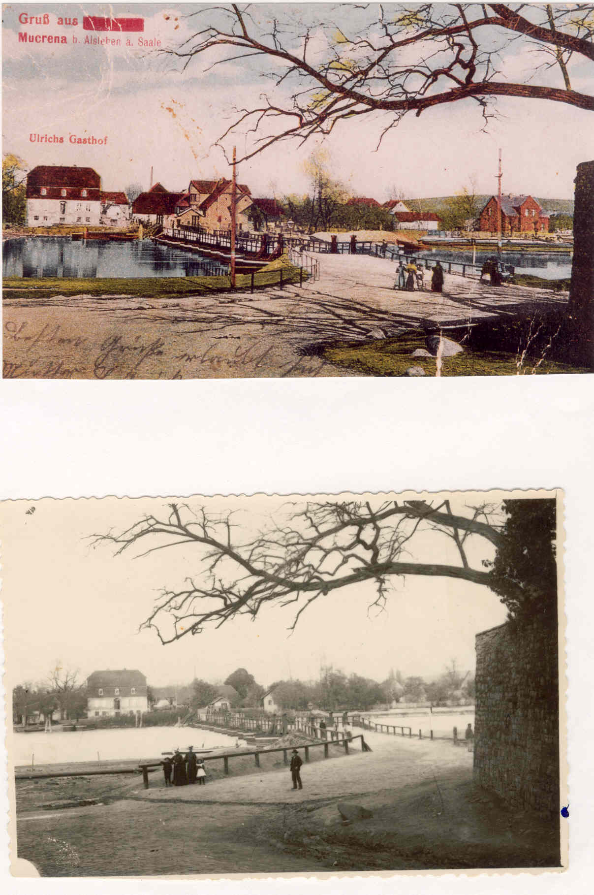 Mukrena um 1900 (eigene Arbeit)